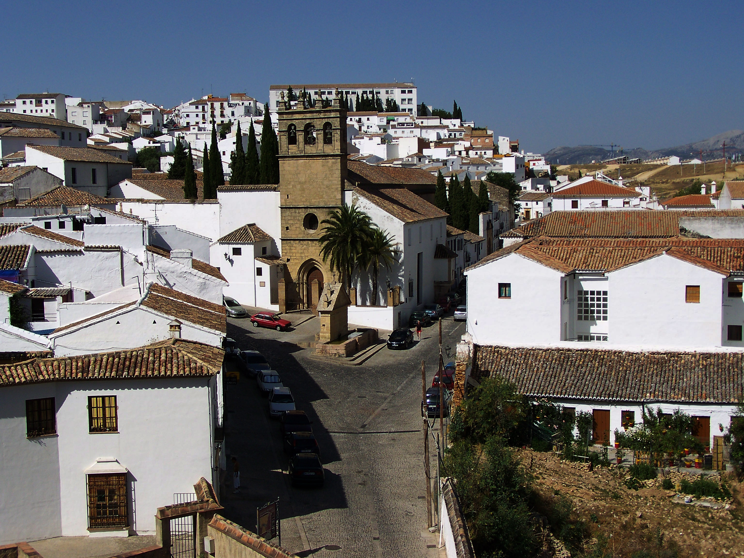 Iglesia del Padre Jesús, Ronda, España.